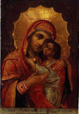 Икона от Тревненската художествена школа. Богородица с Христос – Йоаникий папа Витан Млади-фрагмент.